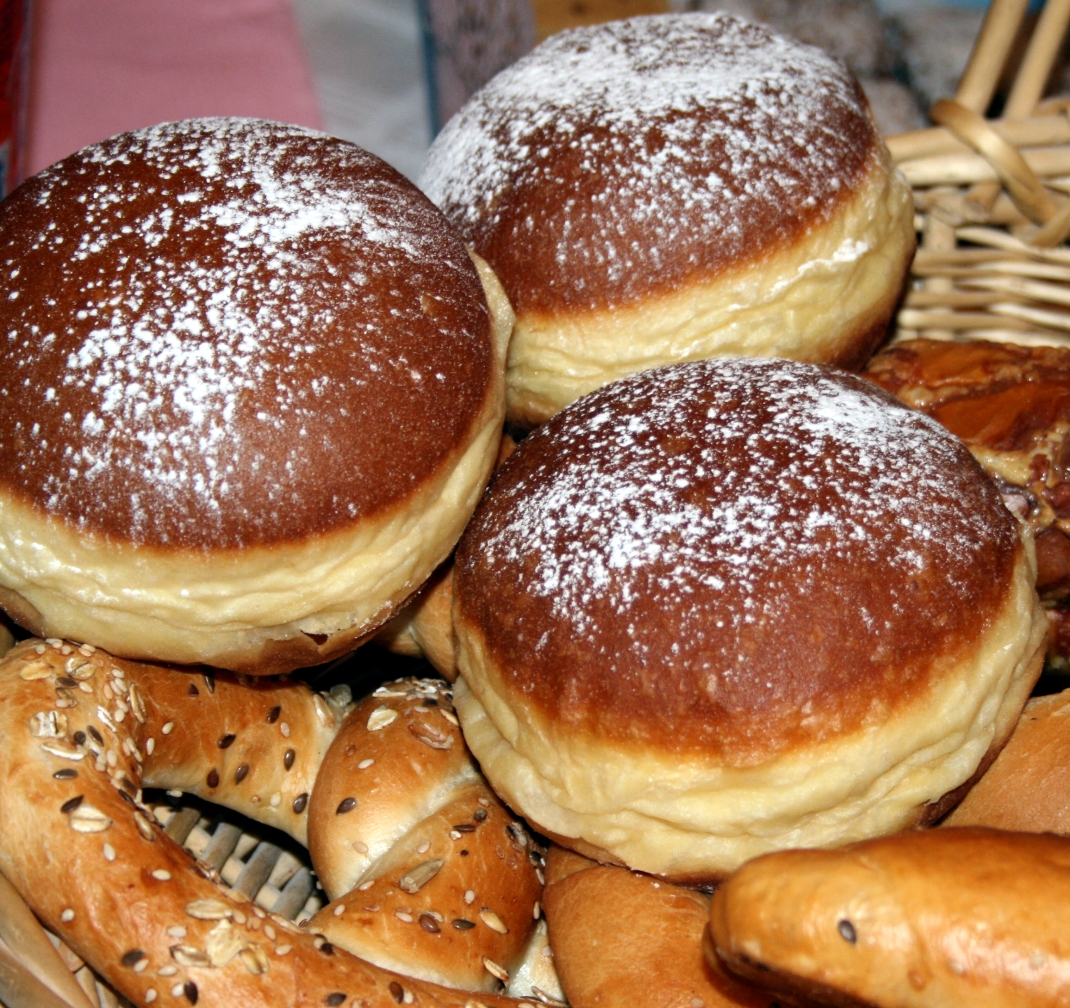 Pokladnice, Križevci, Croatia